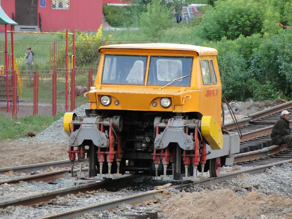 Шпалоподбивочная машина ШПМА-4К на строительстве трамвайной линии в Казани.